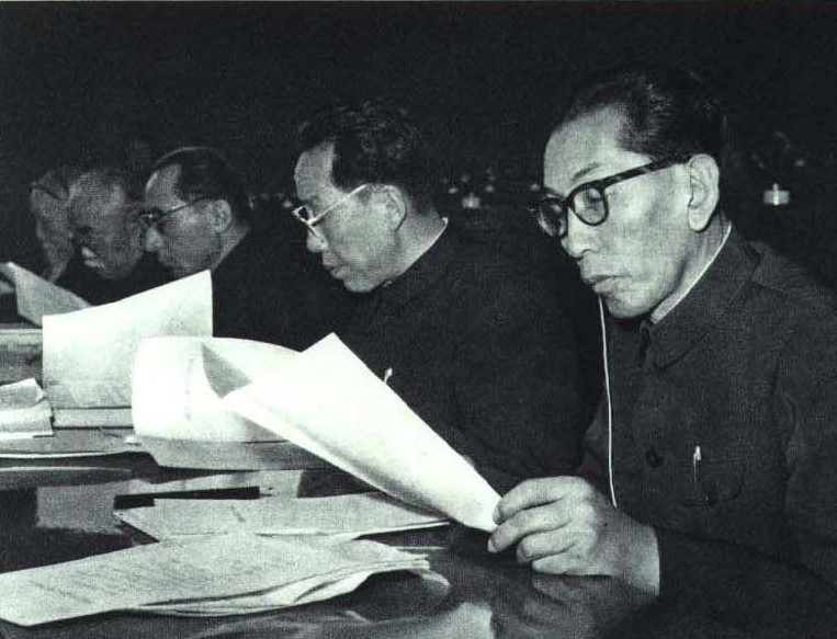 1965-3 1965年 第三届人大的阿沛·阿旺晋美